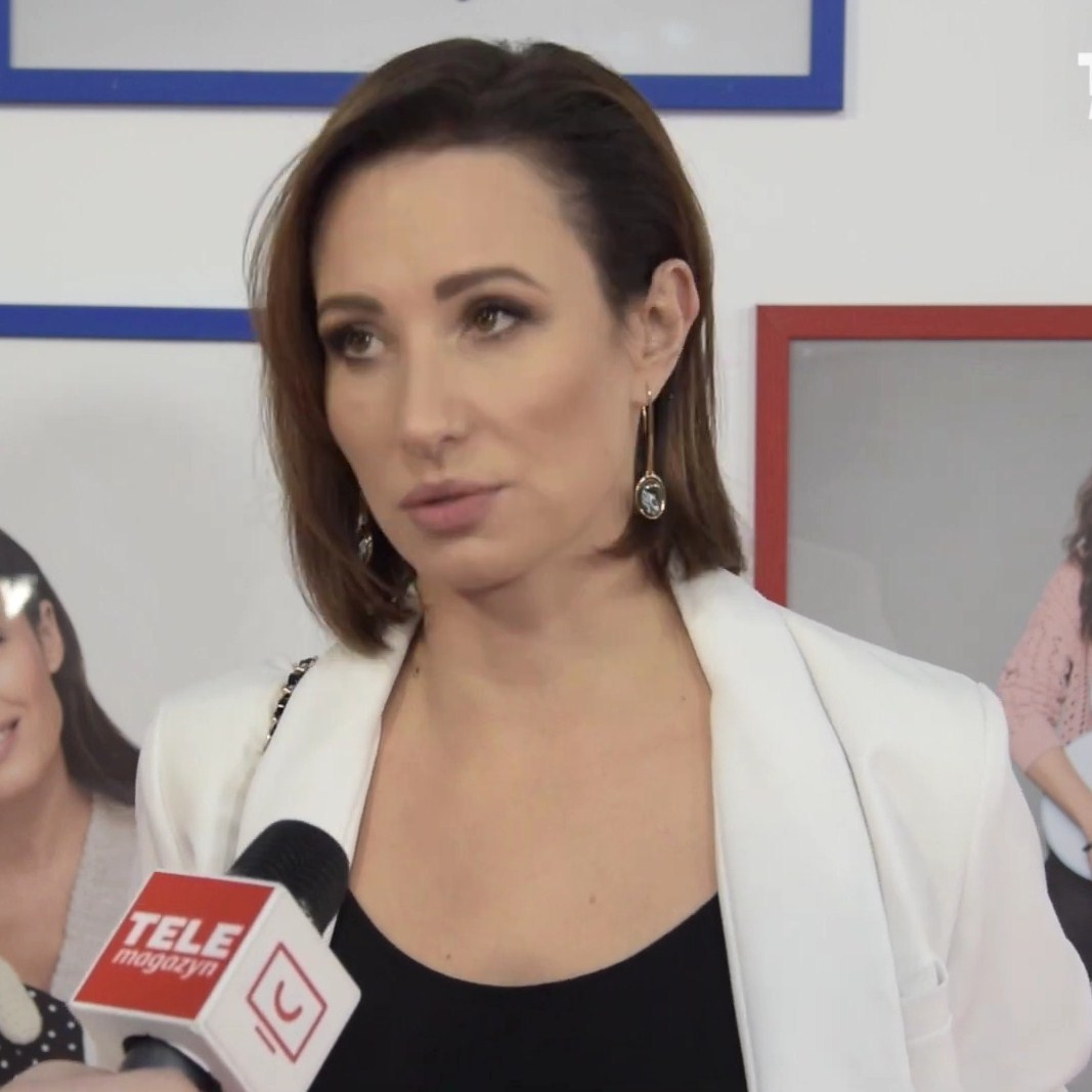 Aleksandra Popławska, aktorka.